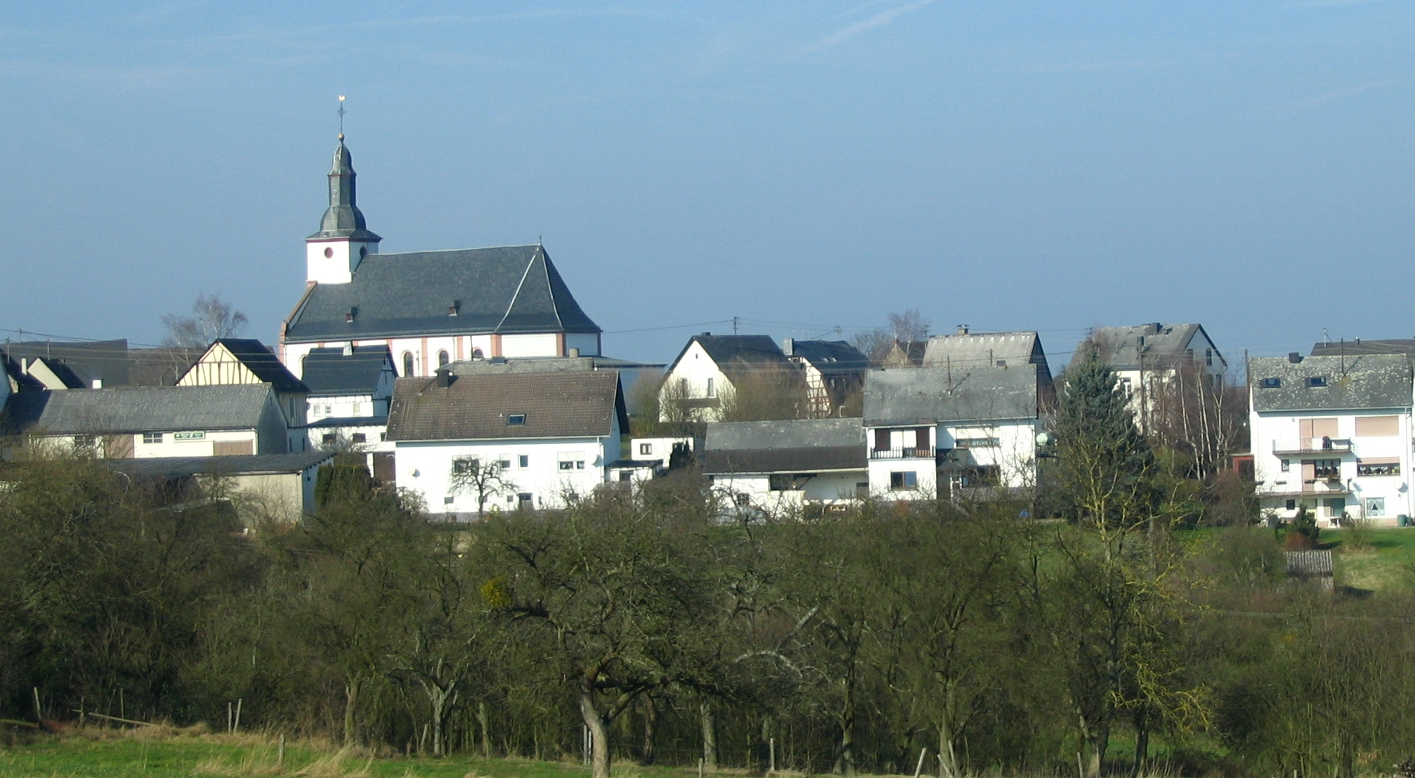 Südansicht von Mittelstrimmig im Hunsrück